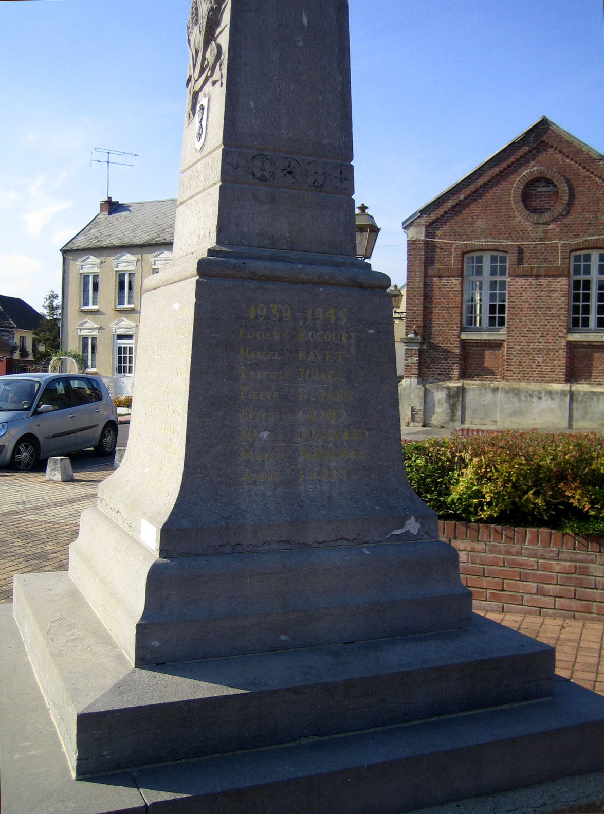 Heilly (Somme, France) - Le monument-aux-morts.